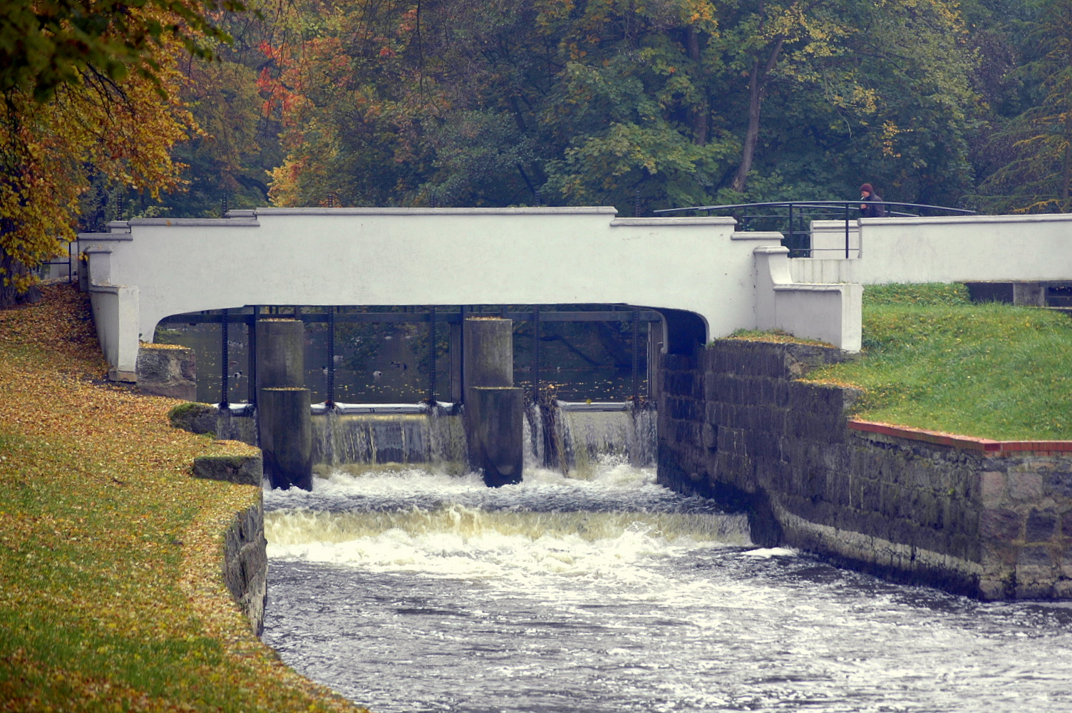 Jaz na Młynówce w Stargardzie Szczecińskim